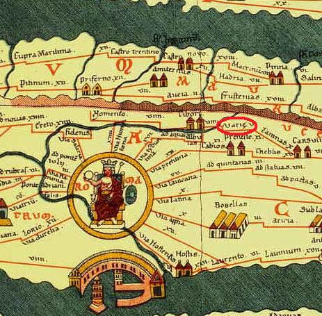 Tabula Peutingeriana, erstes bis viertes Jahrhundert. Faksimile hg. v. Conradi Millieri, 1887/1888